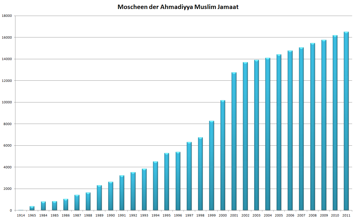 Moscheebau der Ahmadiyya Muslim Jamaat von 1914 (12 Moscheen) bis 2011 (16.505 Moscheen)